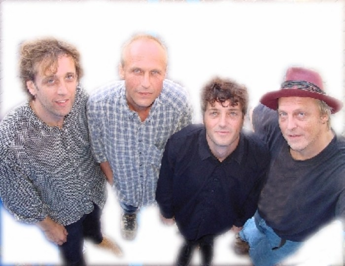 Amadan, Irish/Dutch band